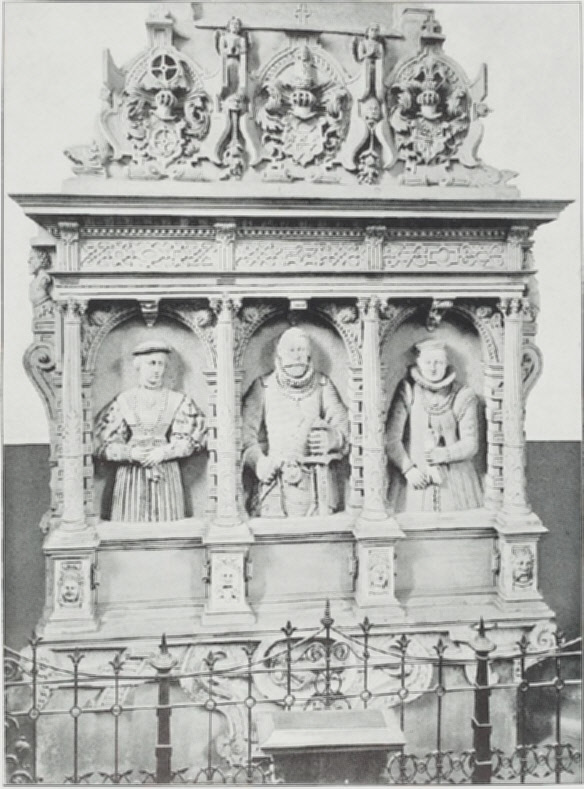 Grabmal des badischen Kanzlers Martin Achtsynit in der Schlosskirche Pforzheim. Es zeigt Achsynit mit seinen beiden Frauen.